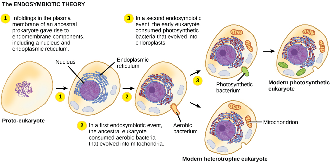 Schéma de formation d'une cellule eucaryote hétérotrophe et autotrophe par absorption de bactéries.